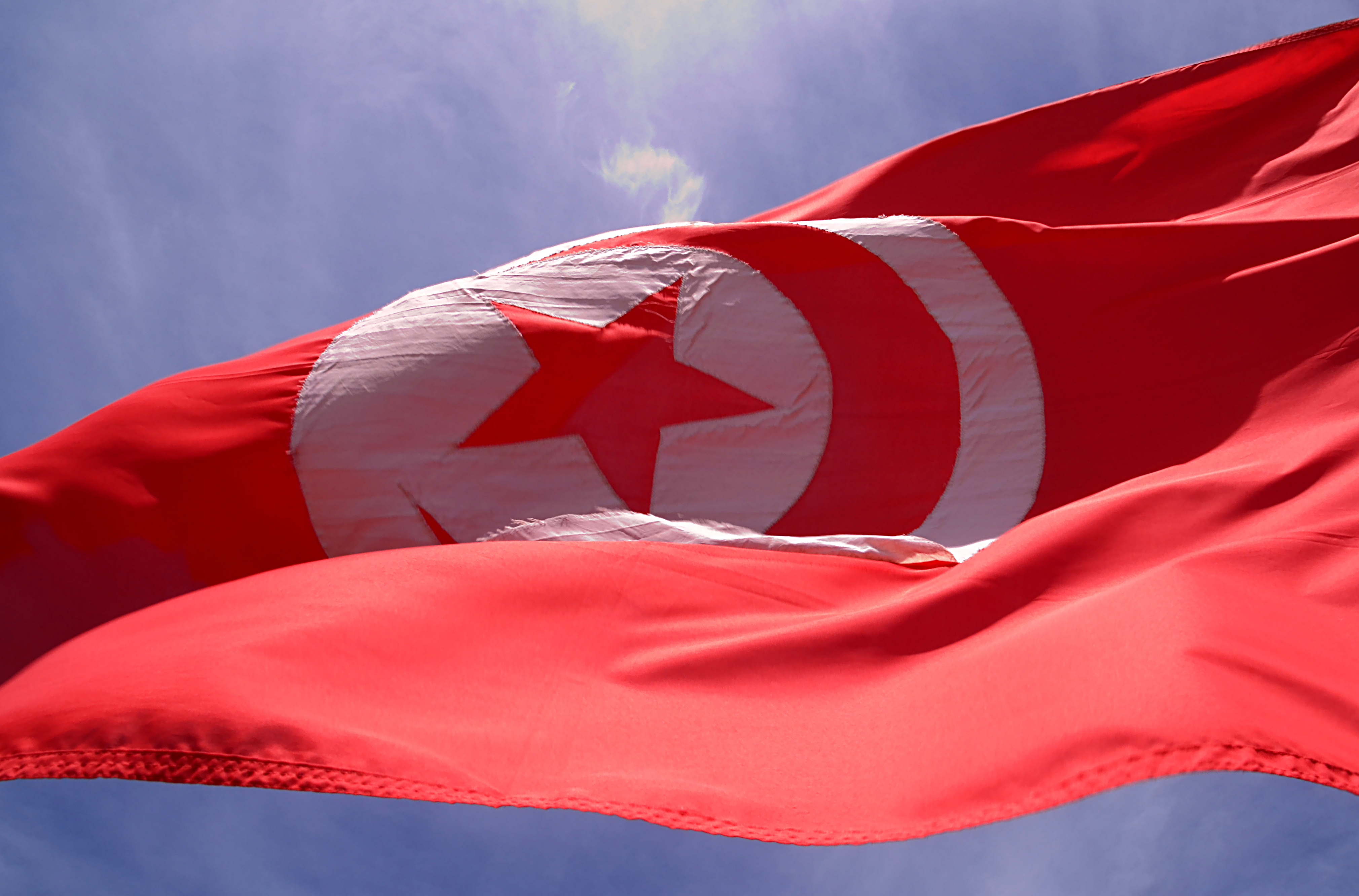 Le drapeau tunisien